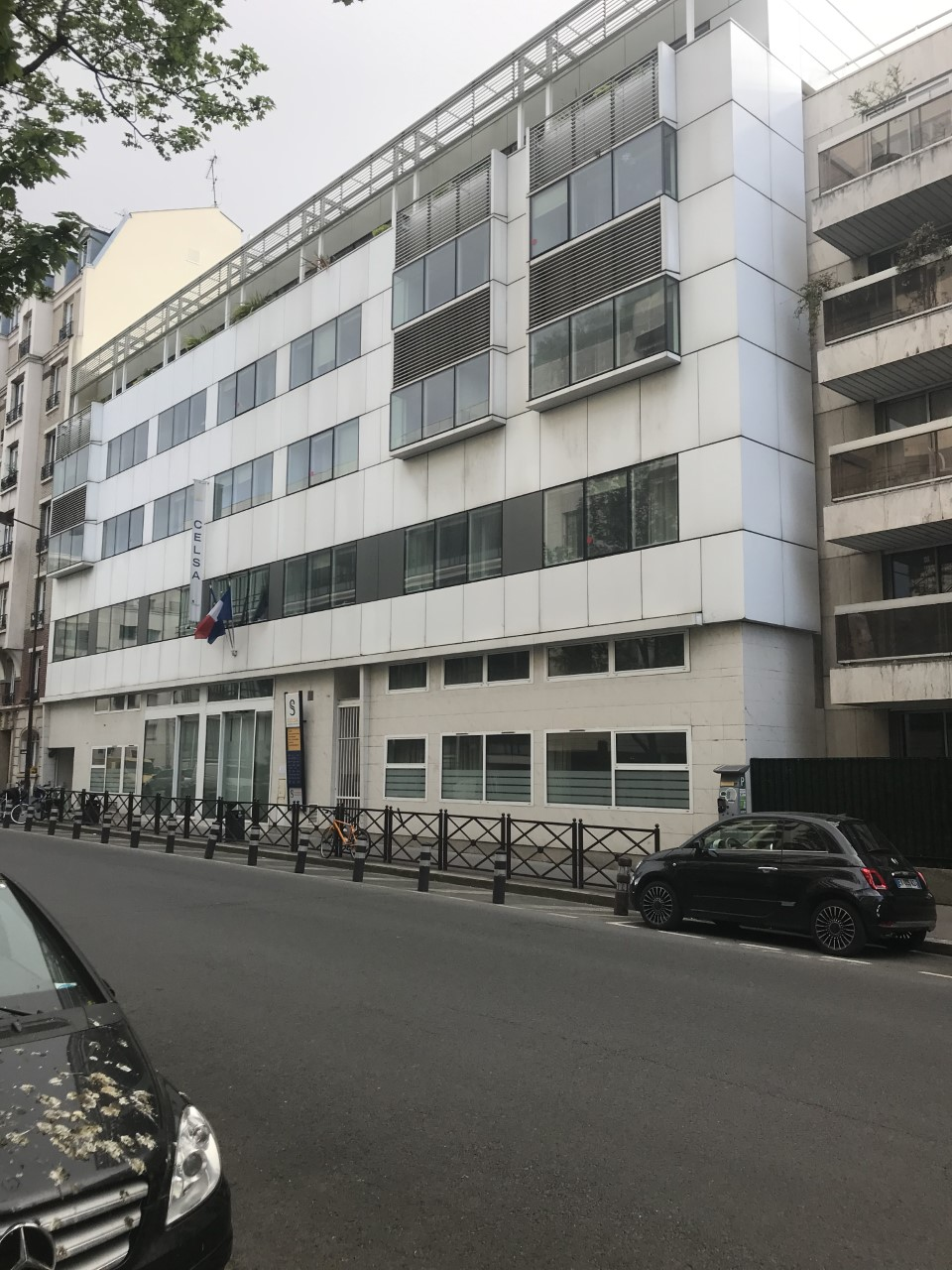 Façade du CELSA à Neuilly.